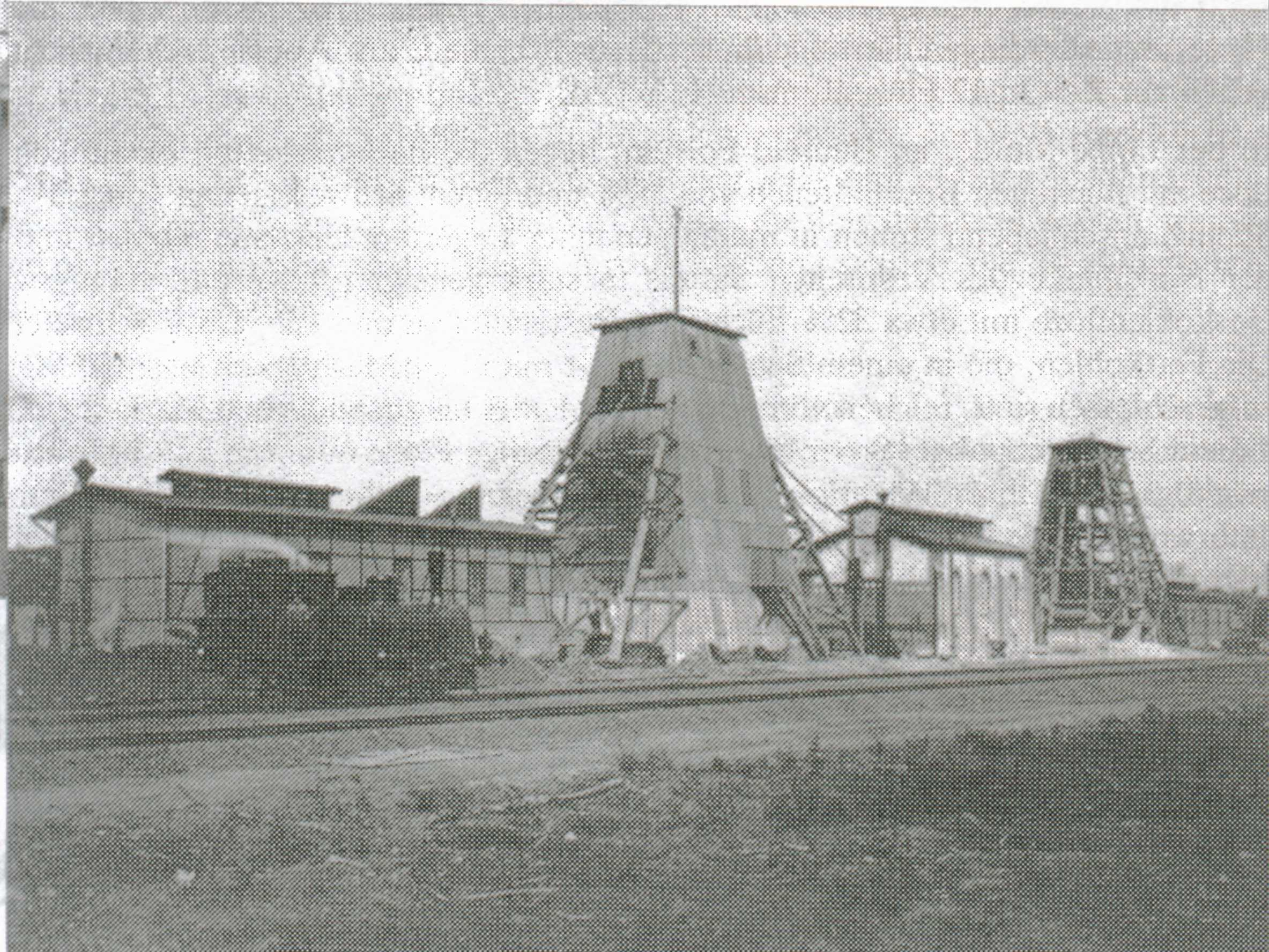 Abteuftürme auf der Zeche Westerholt in Westerholt/Kreis Recklinghausen (heute Herten-Westerholt), Alte Postkarte, Foto aufgenommen 1909/10